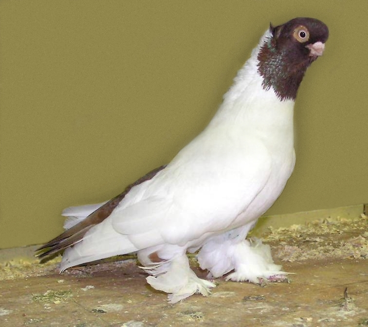 Konigsberg Morehead